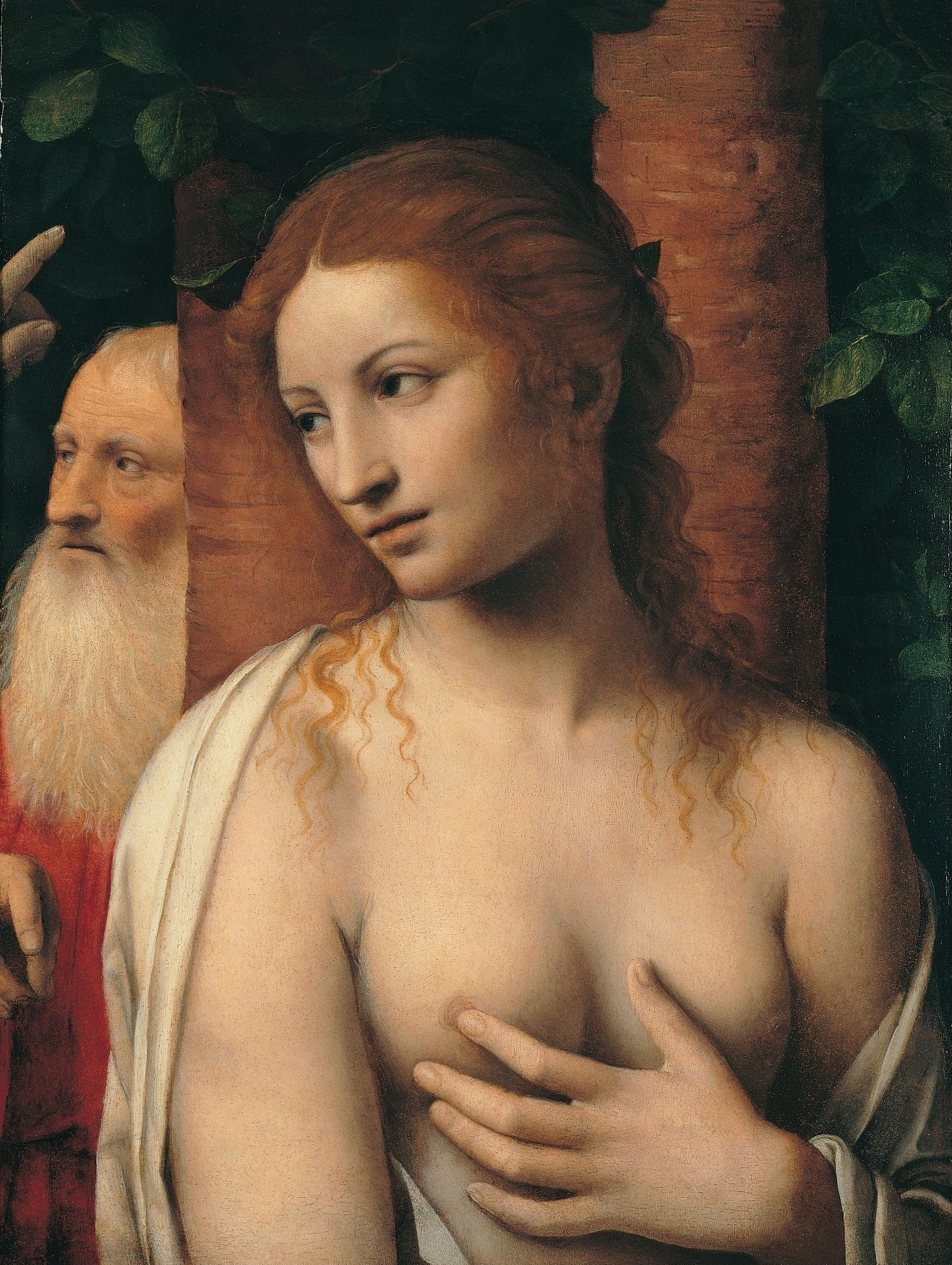 fragment